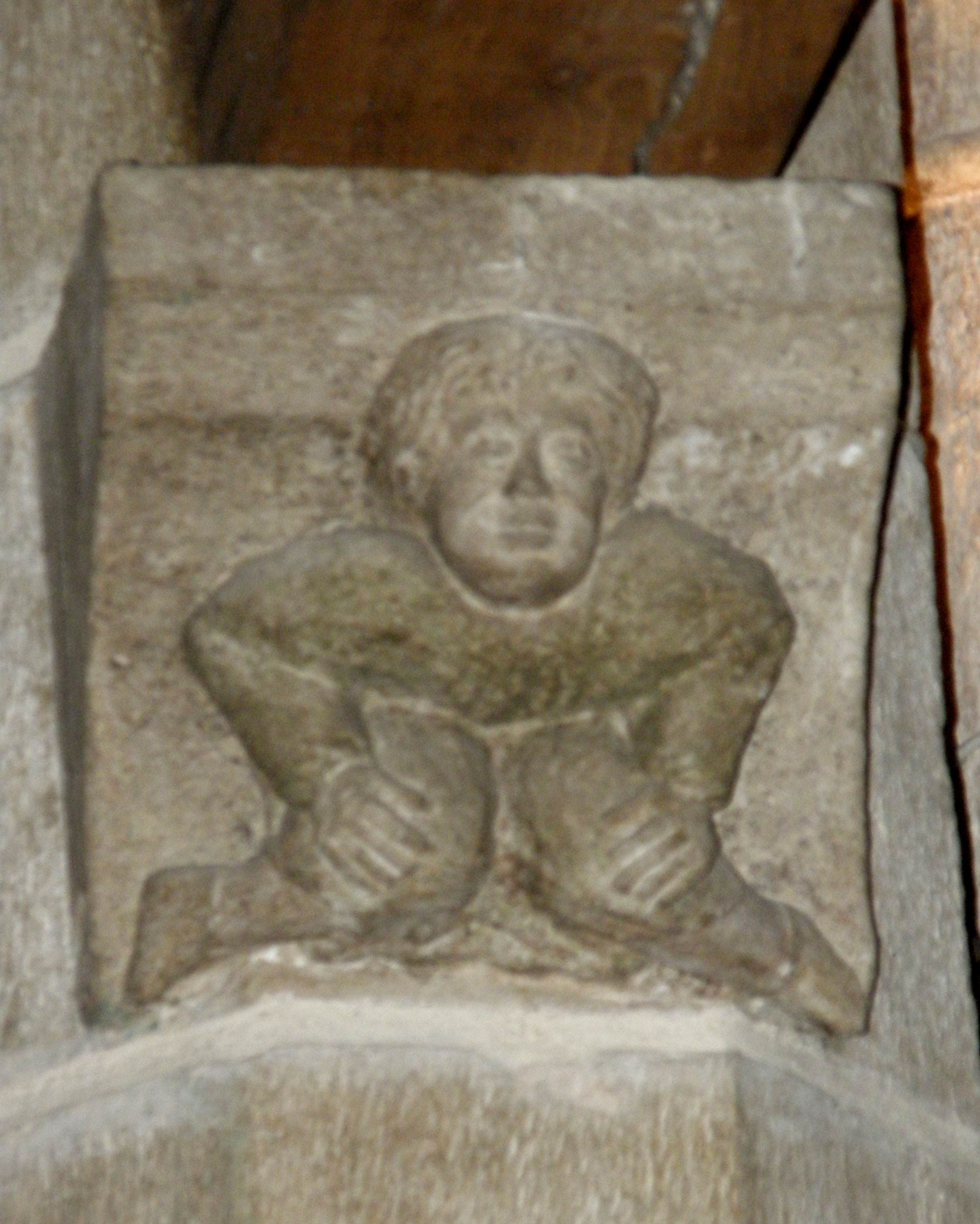 Waldbr. Kie, Konsol.